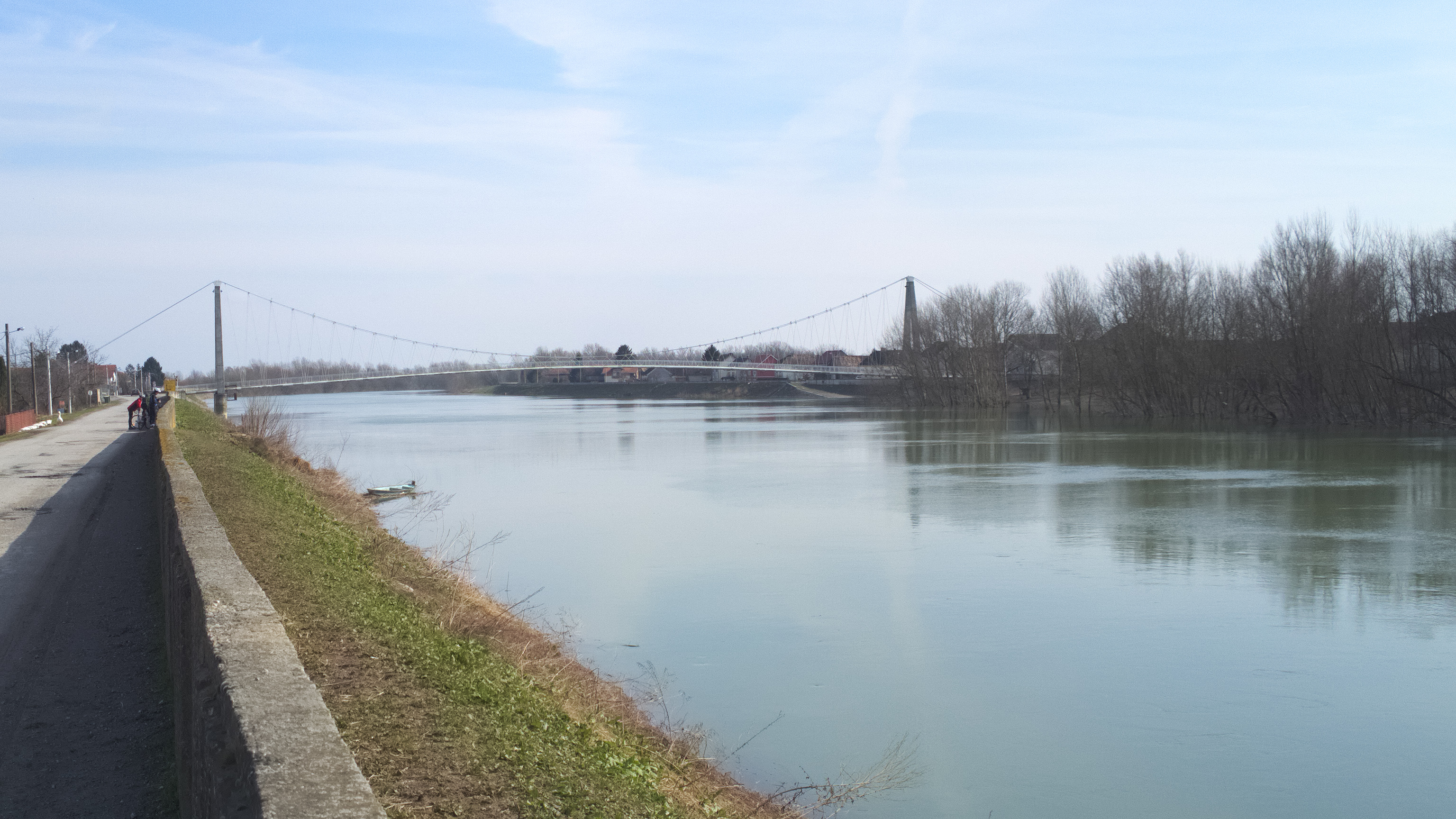 Viseći most u Martinskoj Vesi